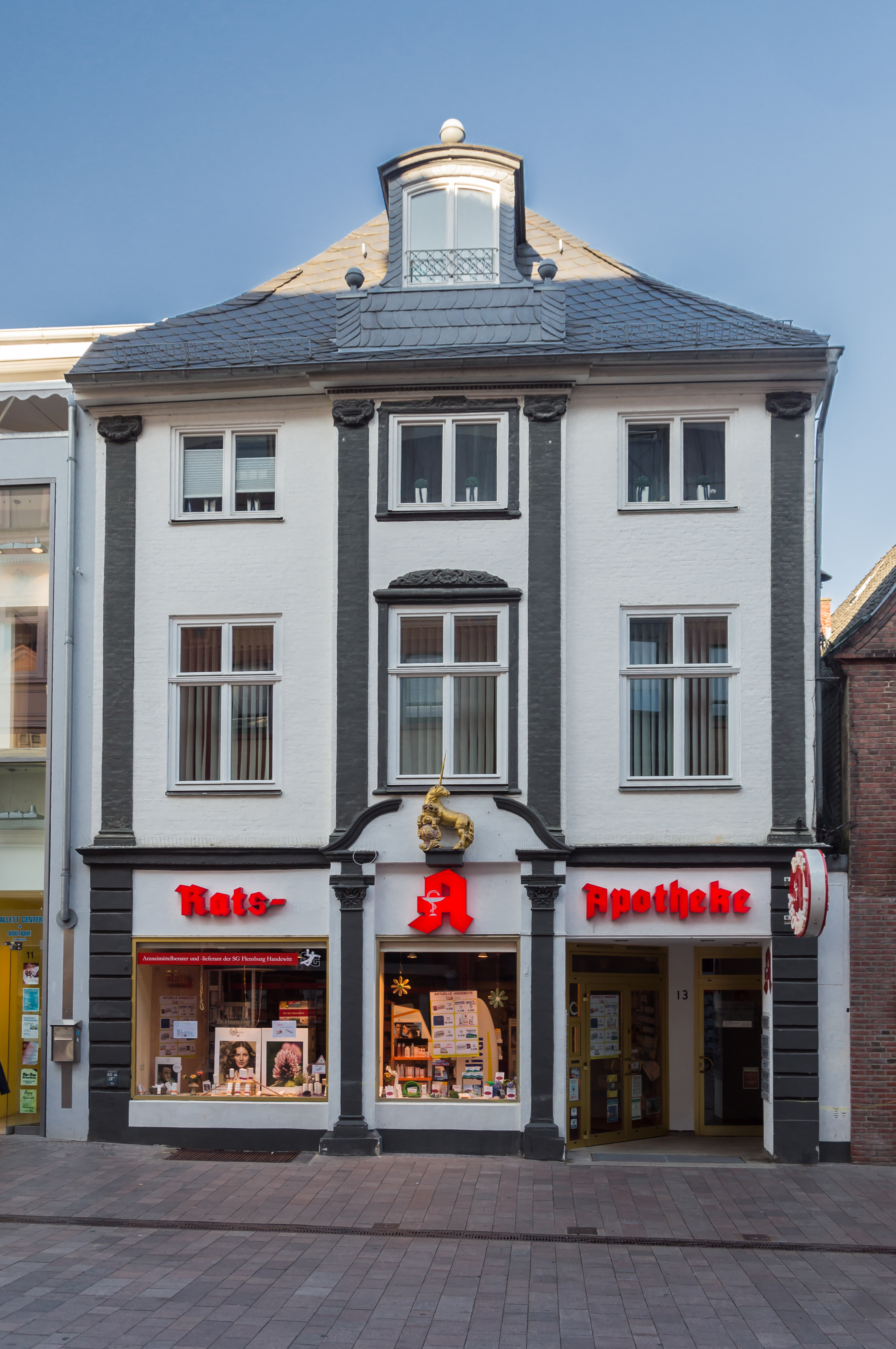 Flensburg-Altstadt, Holm 13, Ratsapotheke Vorderhaus, Denkmal-Nr. 33